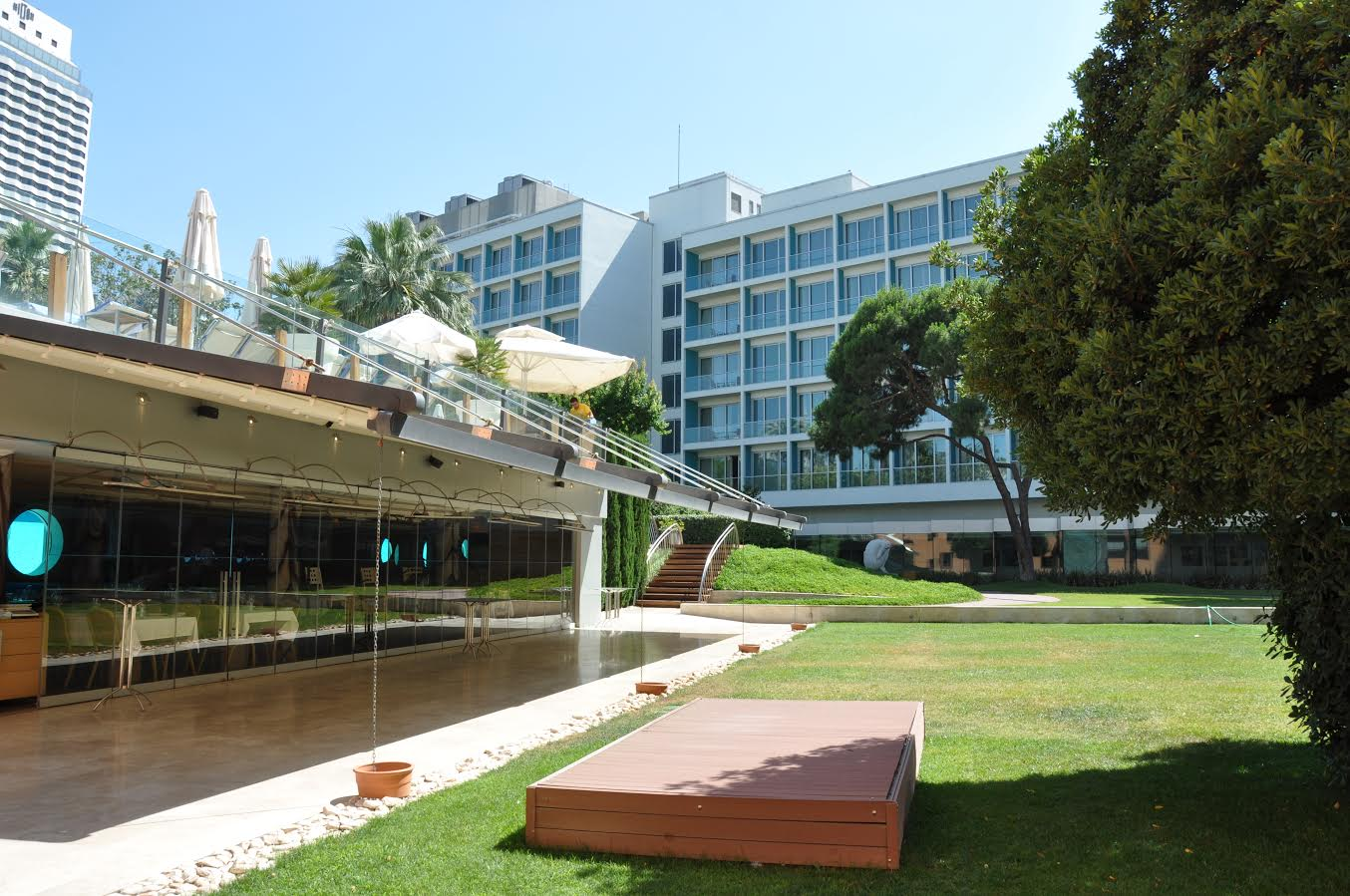 OUTDOOR/GARDEN&POOL